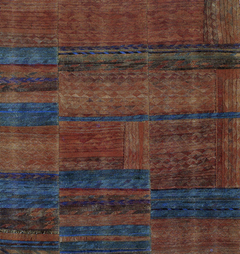 tableau